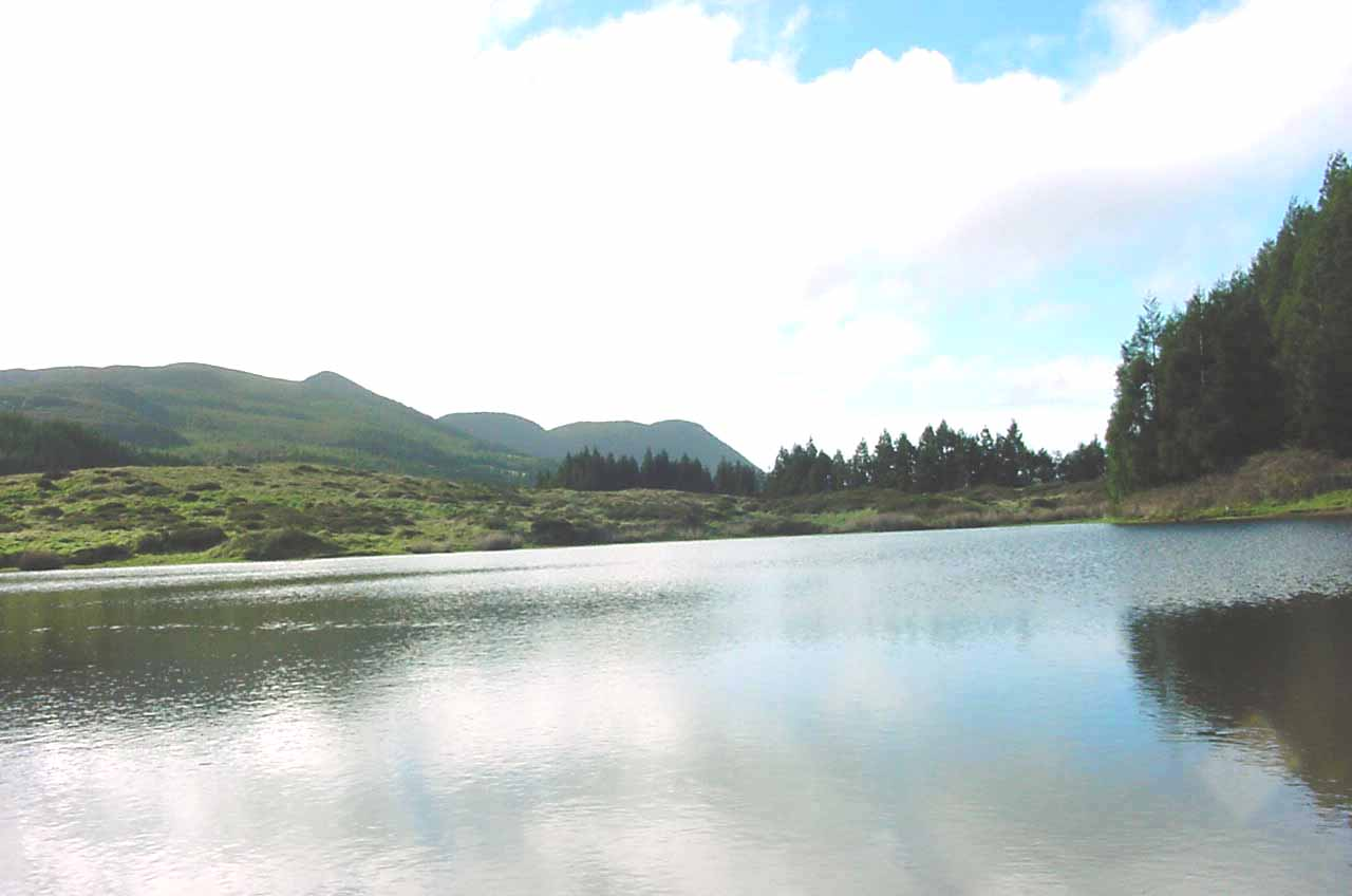 Lagoa do Negro, Angra do Heroísmo, interior da ilha Terceira, Açores, Portugal..